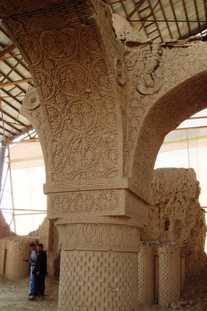 Haj piadeh 9 gonbad